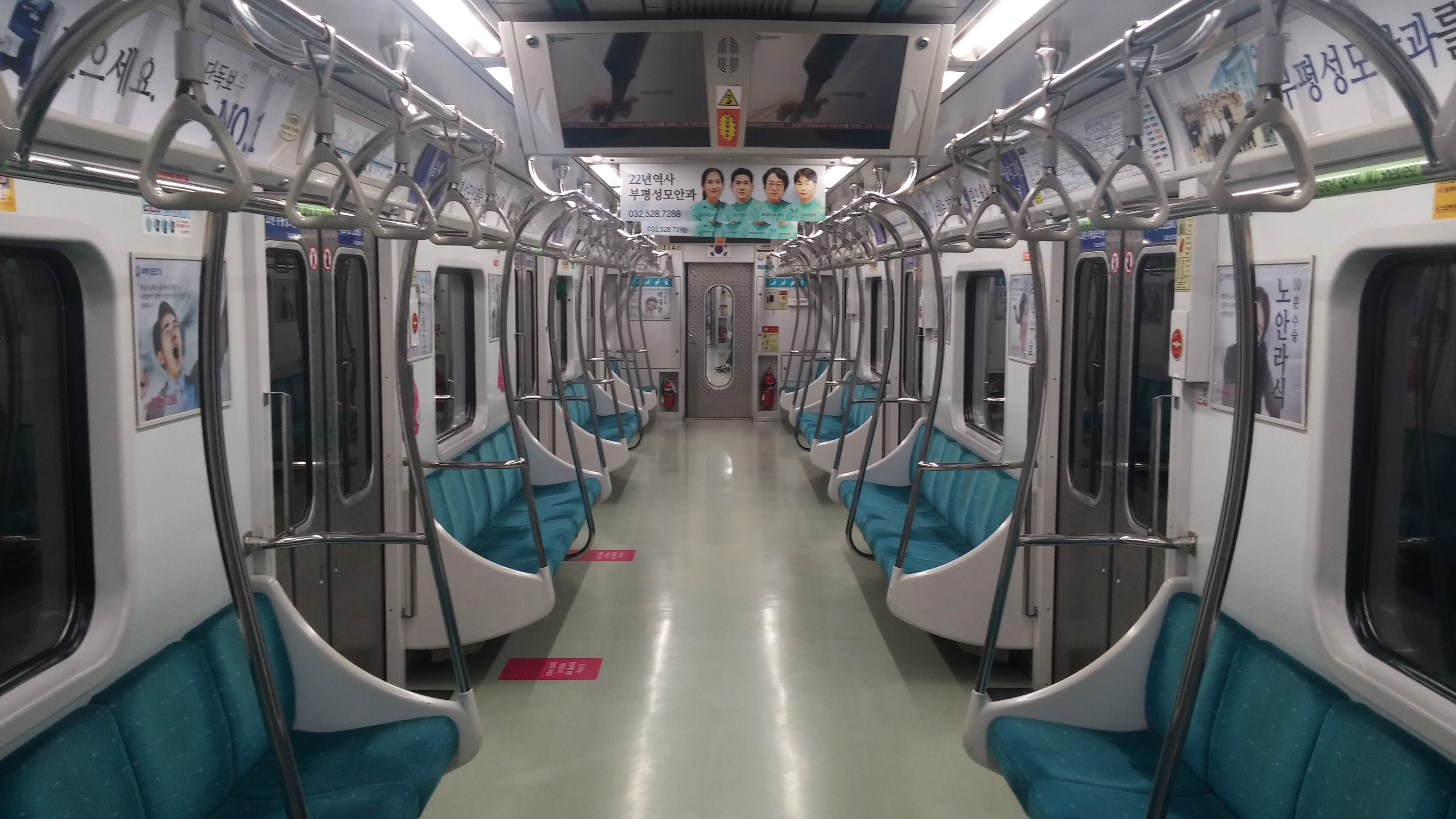 인천교통공사 1127호 내부.